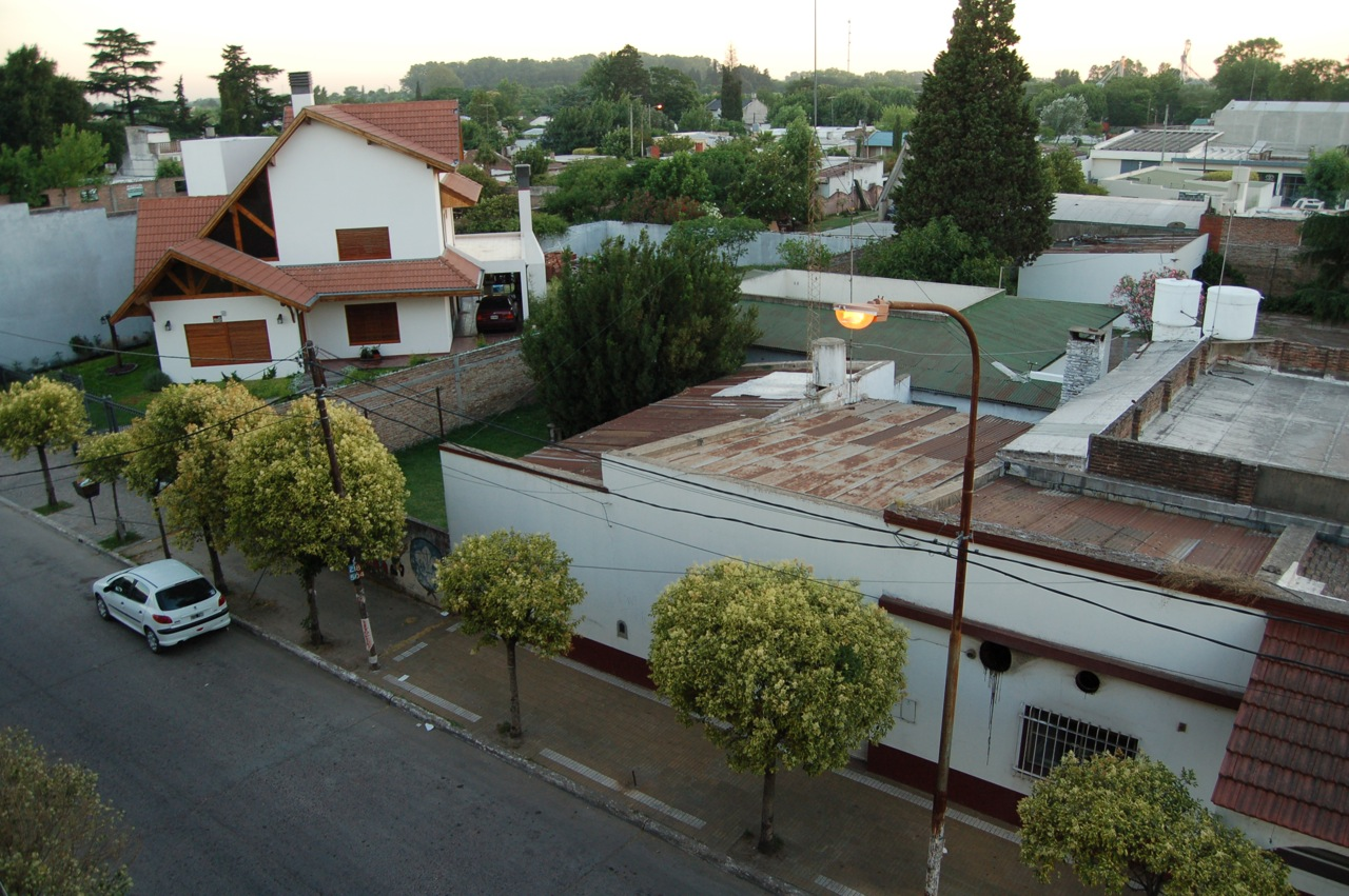 Cañuelas, Argentina.